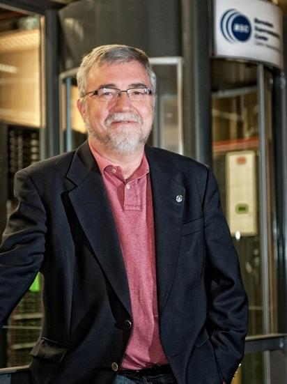 Mateo Valero davant el superordinador MareNostrum del Barcelona Supercomputing Center